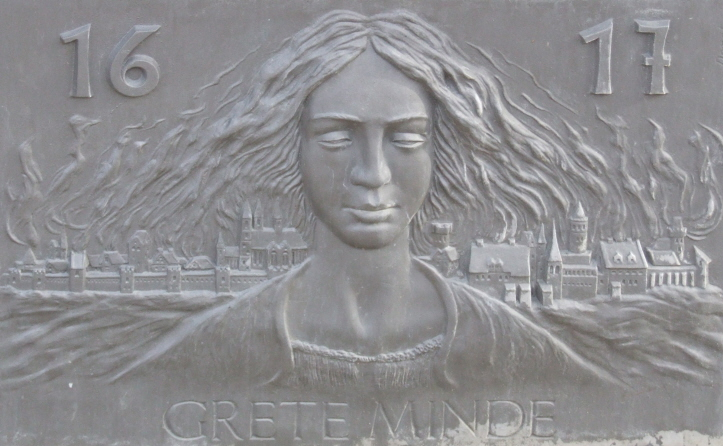 Tafel am Stadtbrunnen vor der St. Stephanskirche in Tangermünde von Karolin Donst, Motiv: Grete Minde